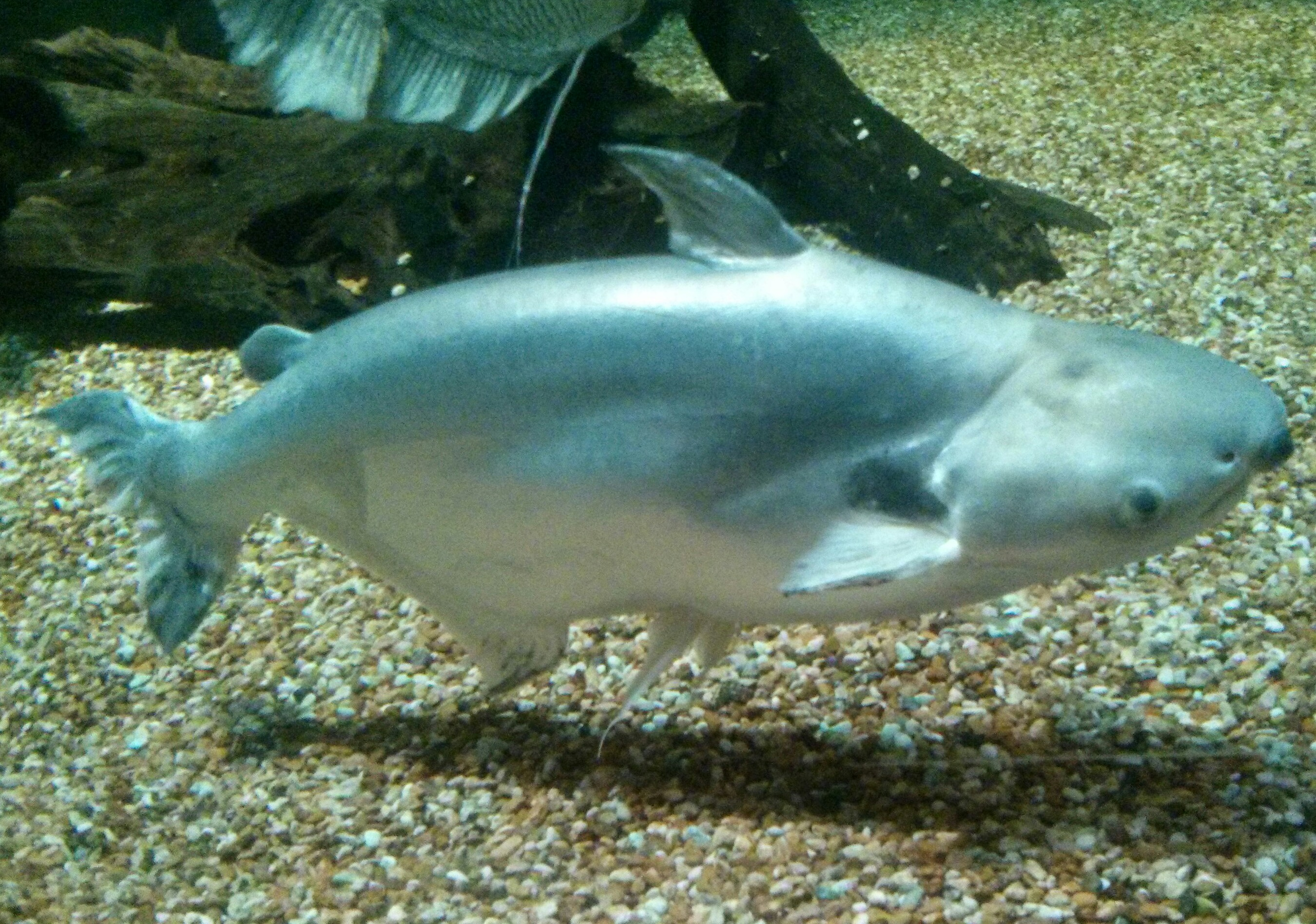 この白パン、アクア・トトぎふで撮影しました。